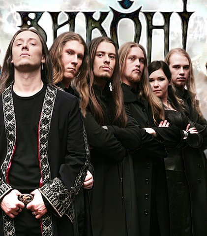 фото группы «Виконт»